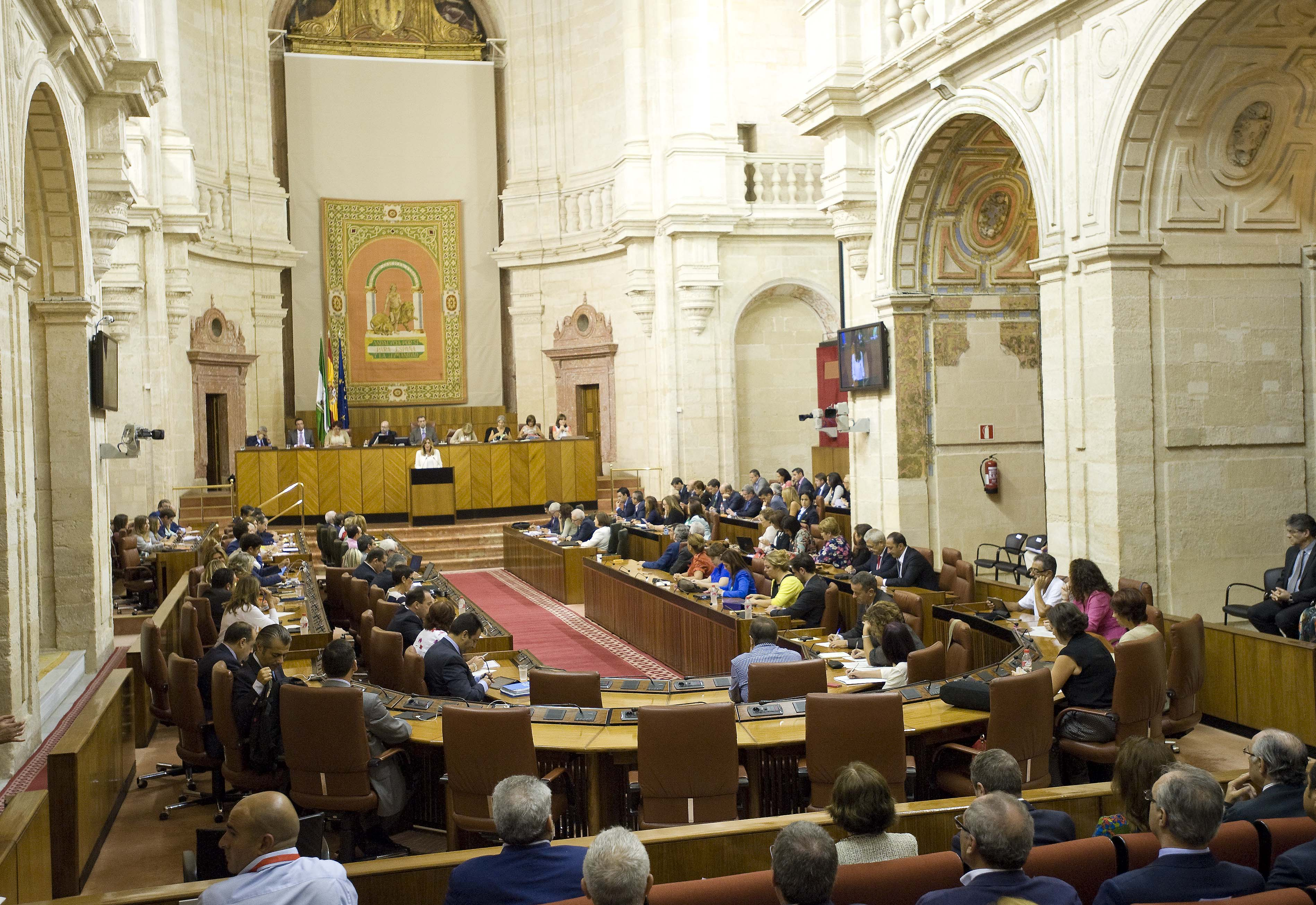 14.09.17 Parlamento 5